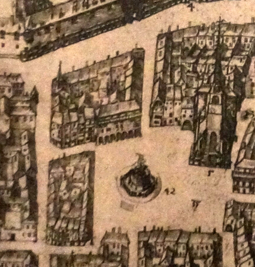 plan de 1611 de Nancy. 42 la grande fontaine, 5 S-Epure Eglise Parochiale, 35 la place de s-Epure où l'on fait la poissonerie et le marché aux herbes.